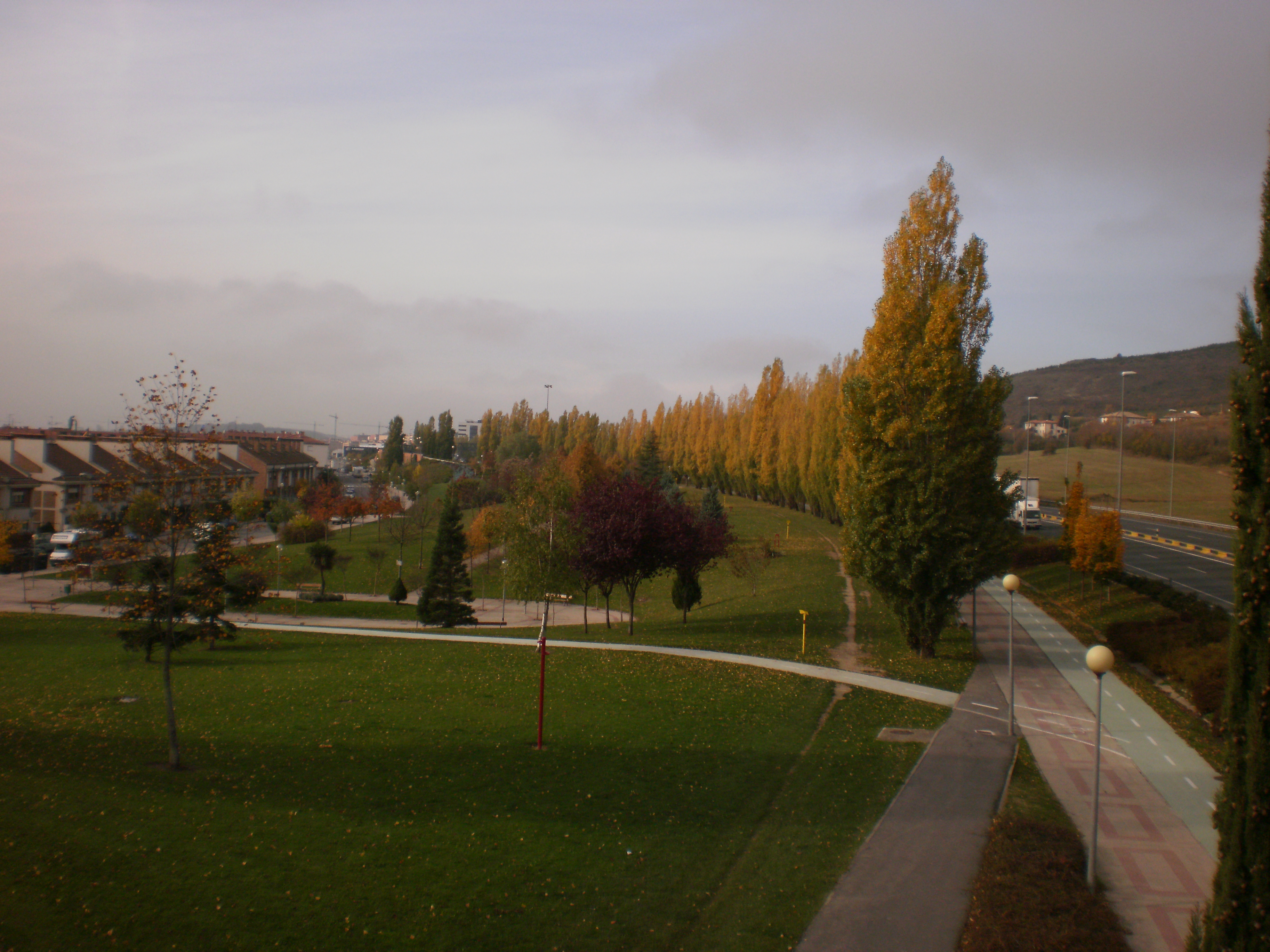 Vista del Parque de la Ronda de Ansoáin (Navarra-España)